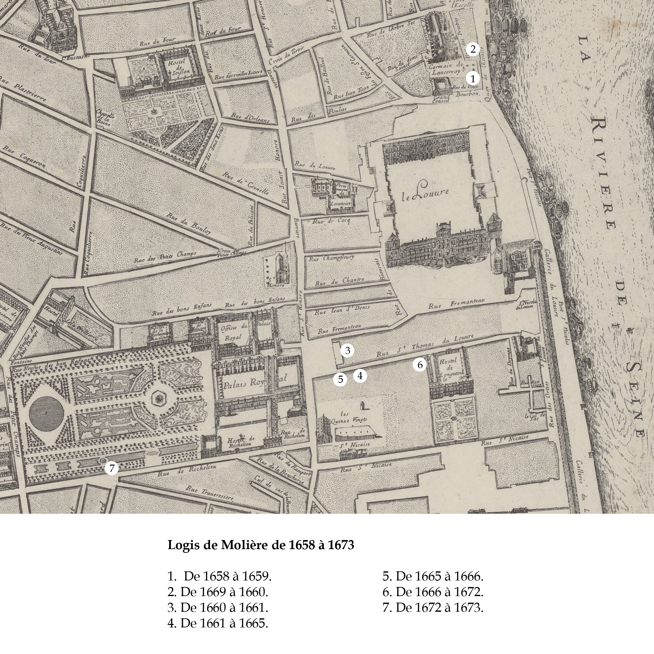 Plan d'après CENT ANS DE RECHERCHES. SUR. MOLIÈRE. SUR SA FAMILLE. ET SUR LES COMÉDIENS DE SA TROUPE, p. 133 [1] - extrait du plan de Bullet et Blondel de 1676